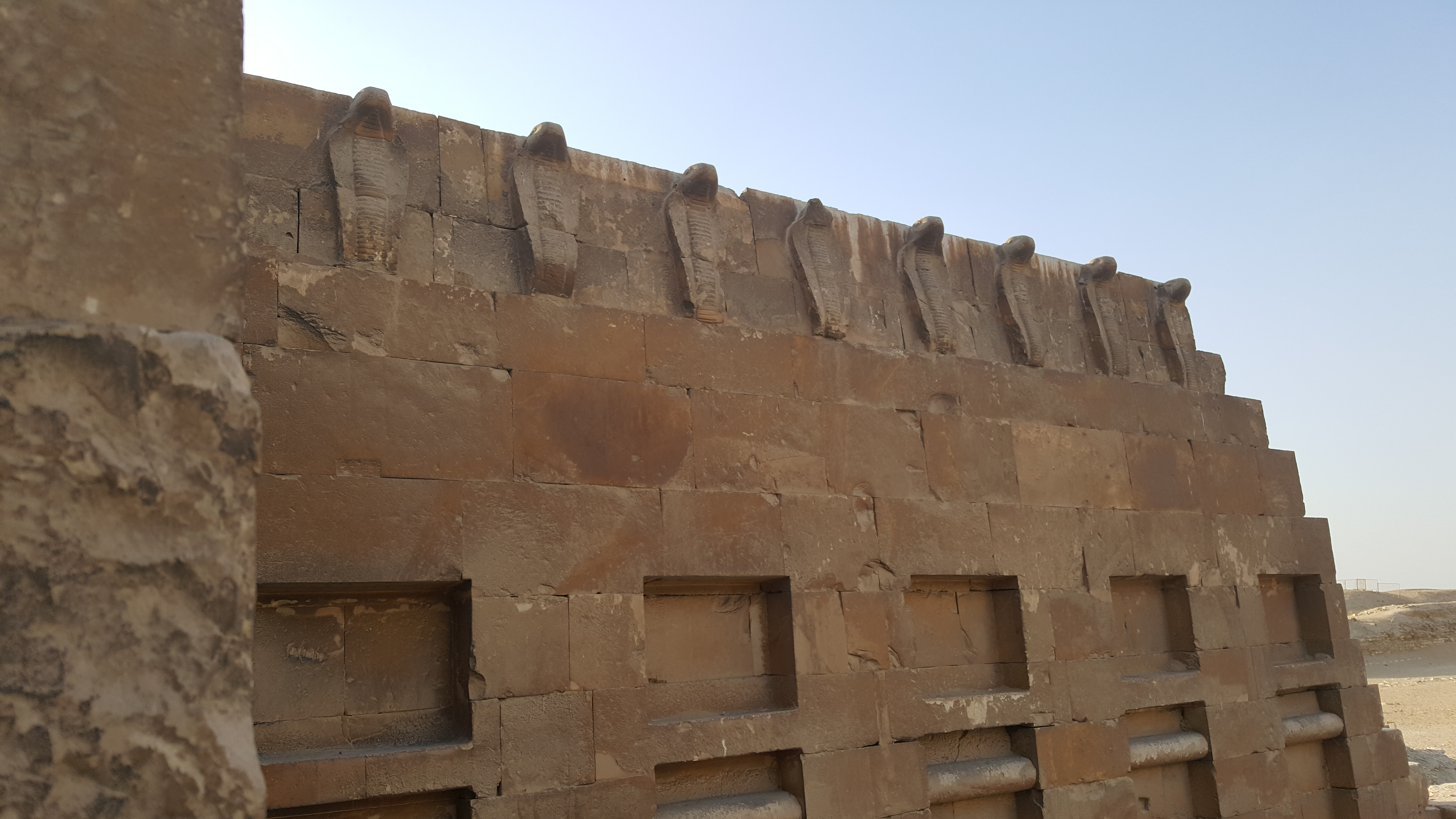 Step pyramid complex of Djoser